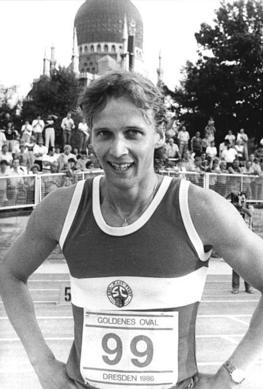 Thomas Schönlebe ADN-ZB Thieme 17.8.86 Dresden: Goldenes Oval- Der Karl-Marx-Städter Thomas Schönlebe stellte sich beim Leichtathletik-Sportfest "Goldenes Oval" am 16.8.86 im Dresdener Heinz-Steyer-Stadion erstmals in diesem Jahr vor und gewann die 400 m in guten 45,01 s.